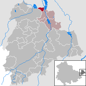 Haselbach in Thuringia - District Altenburger Land